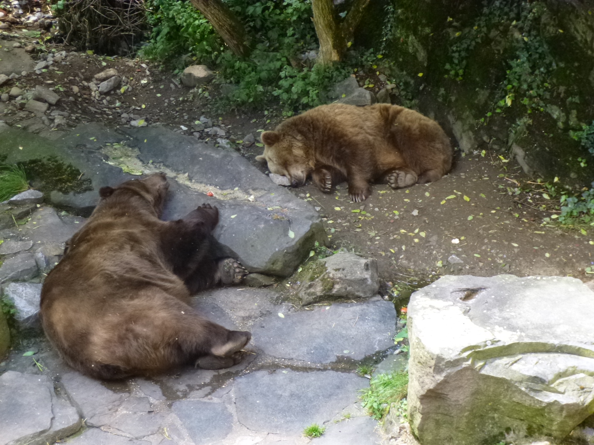 schlafende Bären im Schlossgraben des Schlosses Krummau, Tschechien